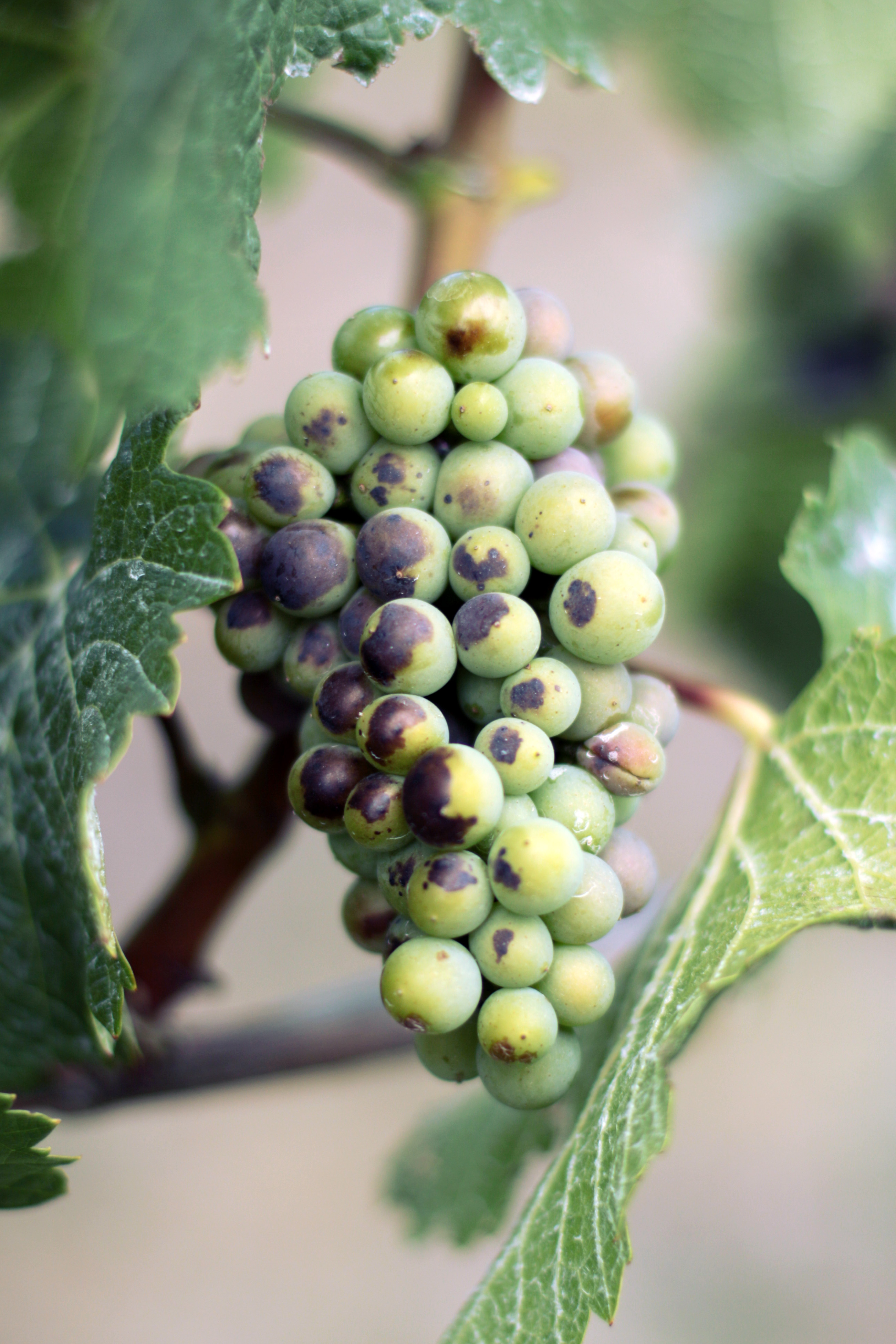 Grappe de Pinot Noir échaudée par le soleil, grains noircis